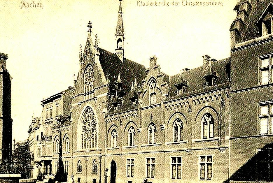 Mutterhaus der christenserinnen von 1899 bis 1974, ehemaliges Jesuitenkloster in Aachen